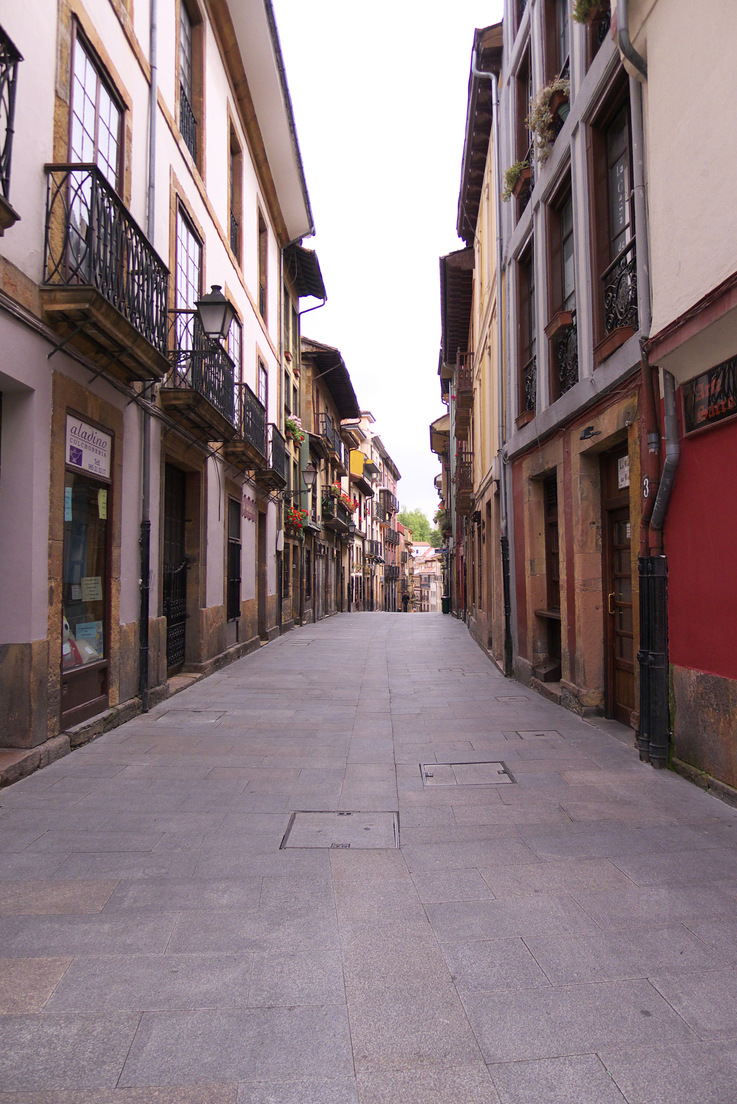 Don Alejandro Mon y Menéndez (1801-1882). Prestigioso jurista, nacido en esta calle. Reformó la Hacienda de España, siendo Presidente del Consejo de Ministros en 1864.